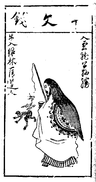 明 陈老莲 木刻版画 水浒叶子 公孙胜